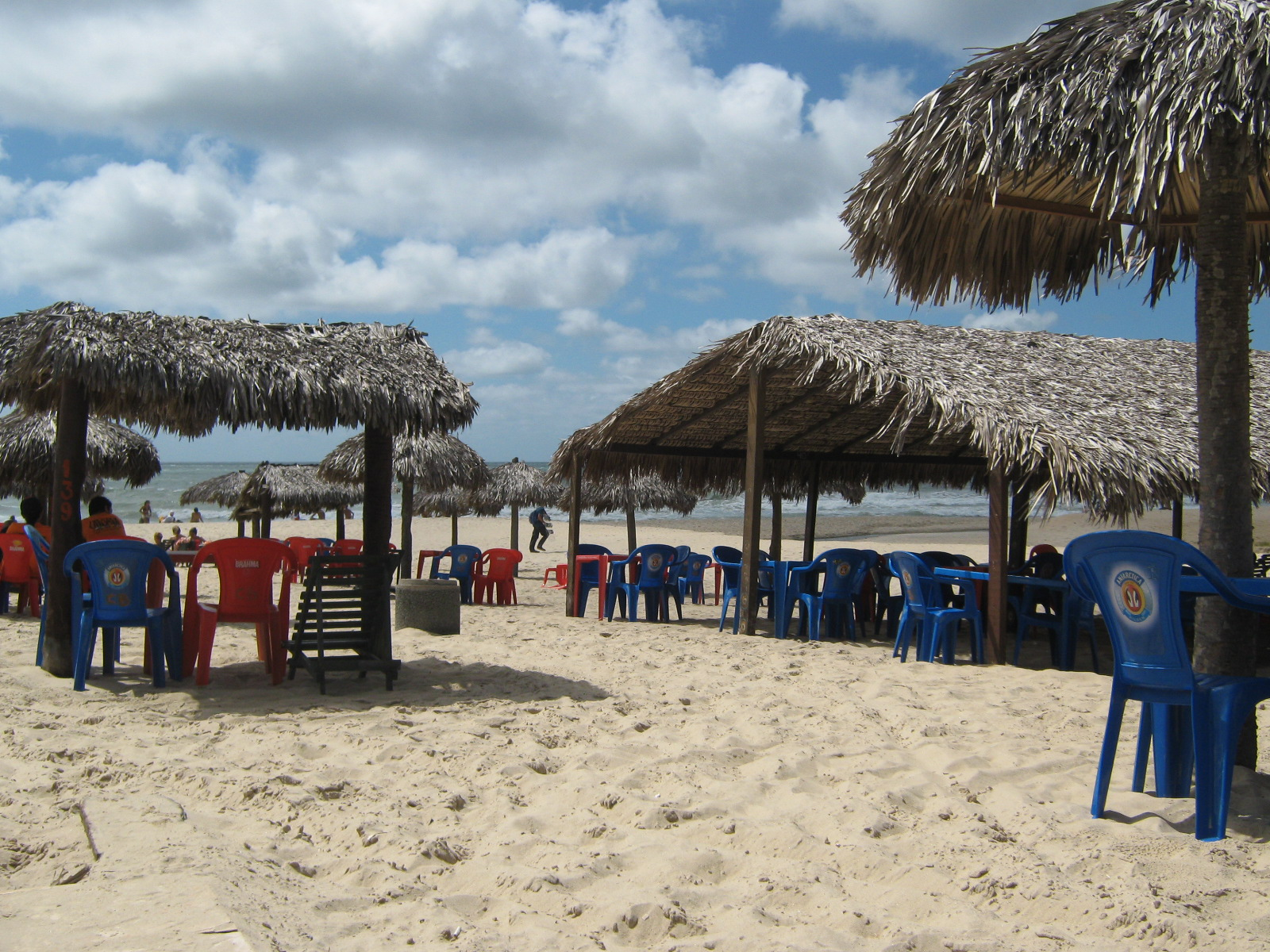 Futuro Beach, Fortaleza, Brazil